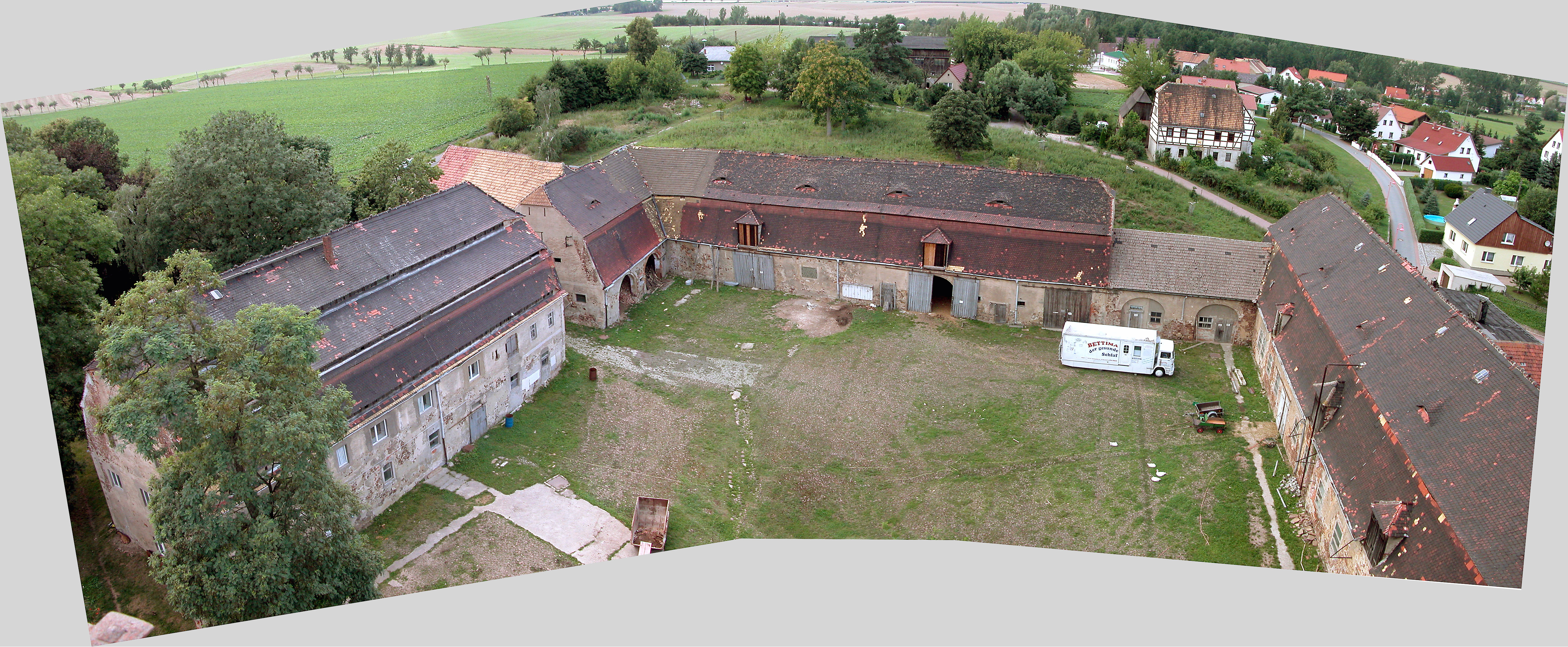 08.08.2006 04749 Noschkowitz (Ostrau): Schloß (15.-17. Jh.). Blick vom vom großen Schloßturm auf den rittergutshof mit Westf-, Nord- und Ostflügel. [DSCN11032-11034.TIF]20060808450MDR.JPG(c)Blobelt